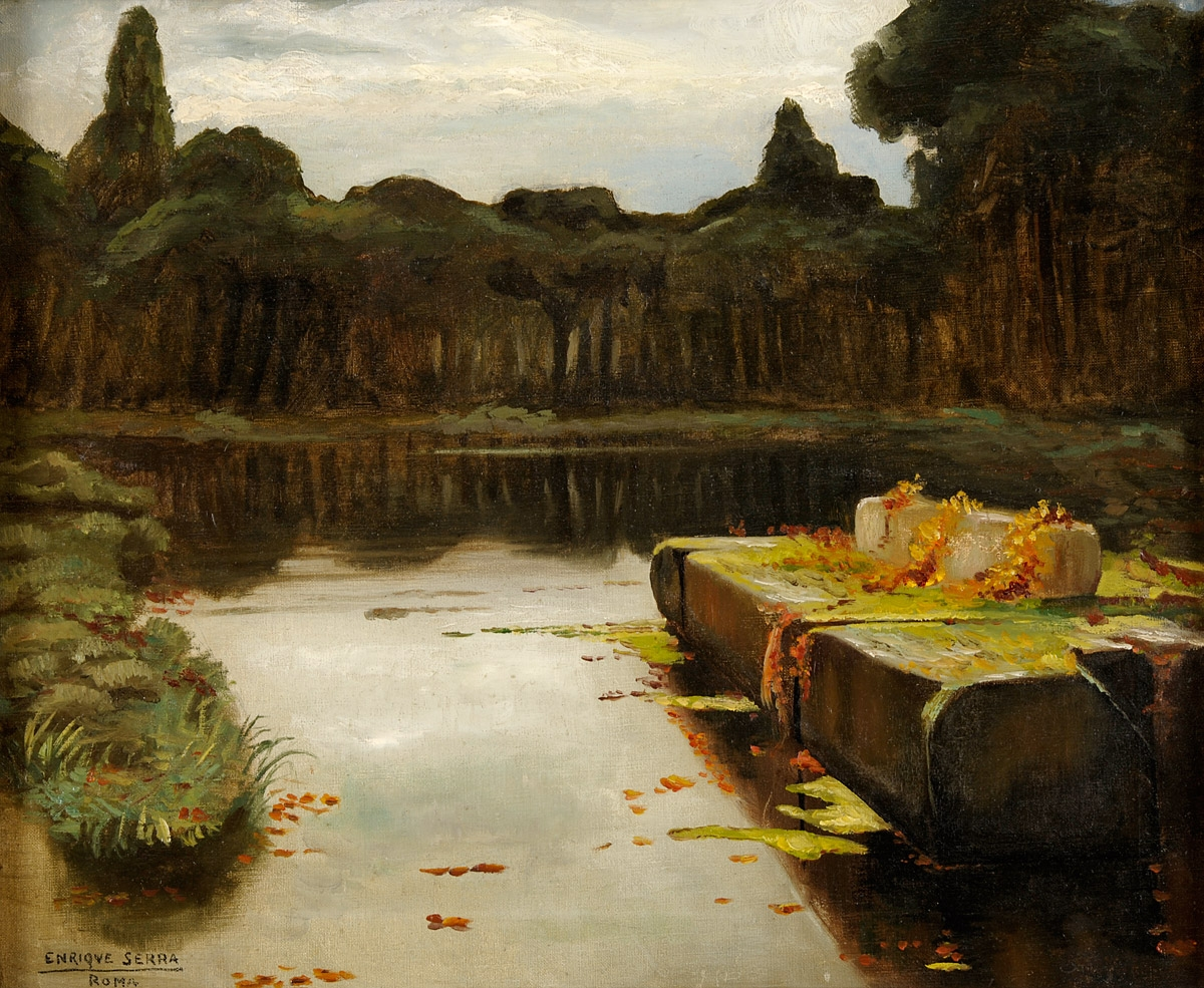 In den pontinischen Sümpfen. Signiert. Öl auf Leinwand, 50 x 60 cm